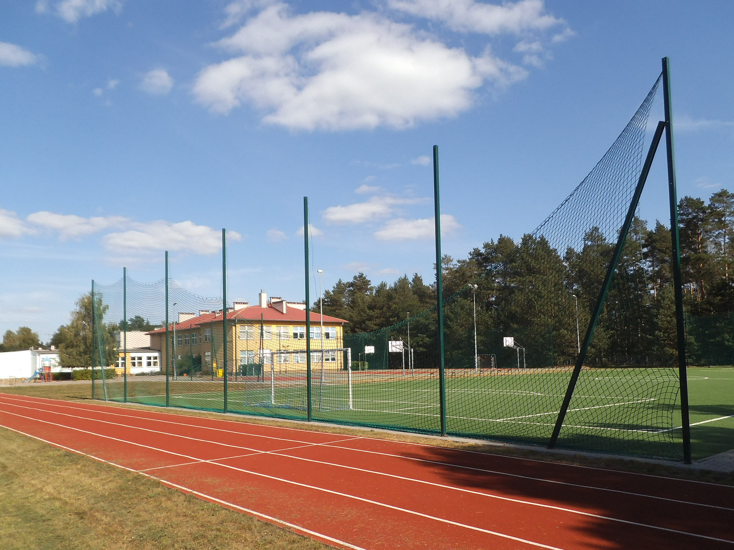 Boisko szkolne na Czerniewicach w Toruniu